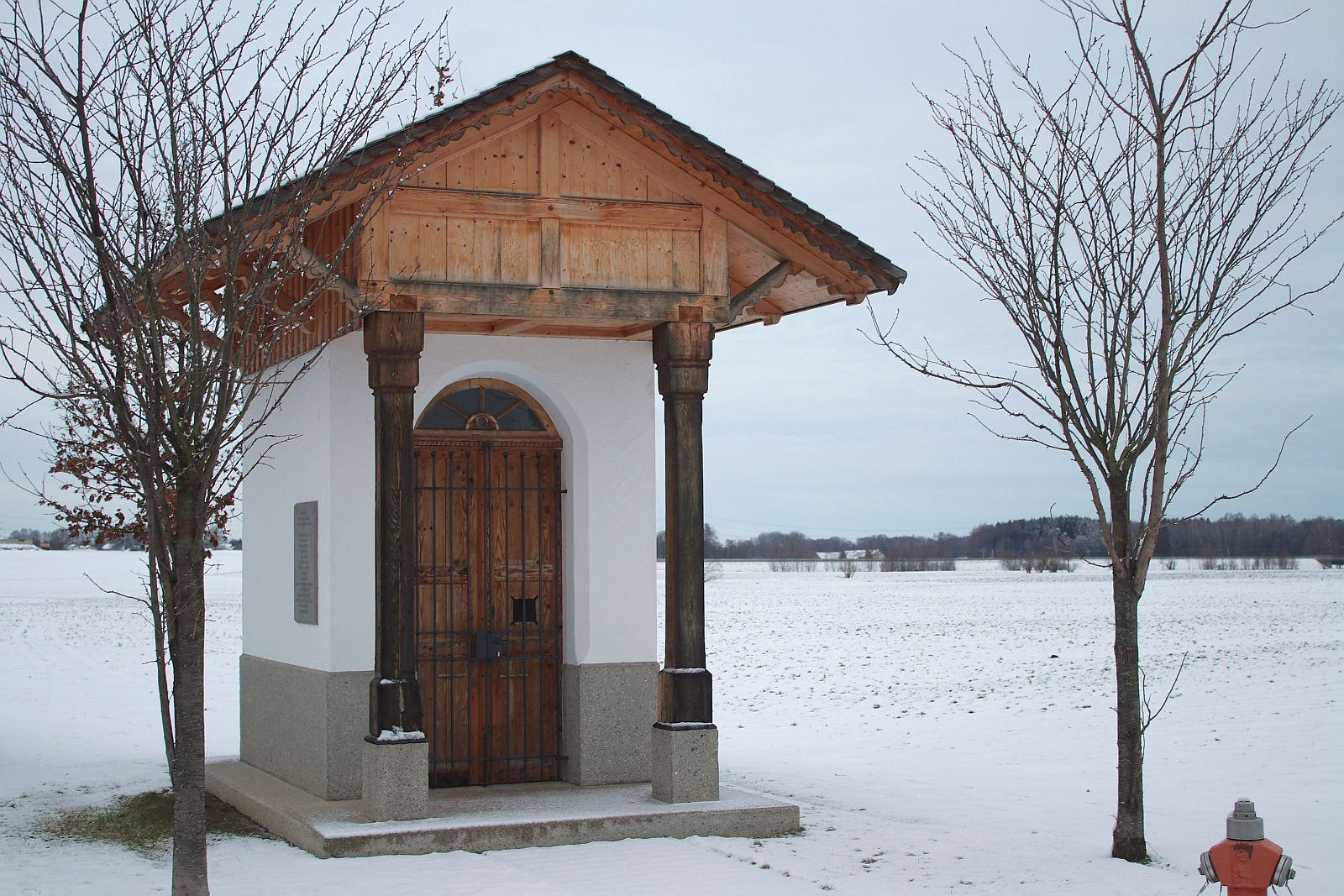 Kümmerniskapelle 2019 Winter